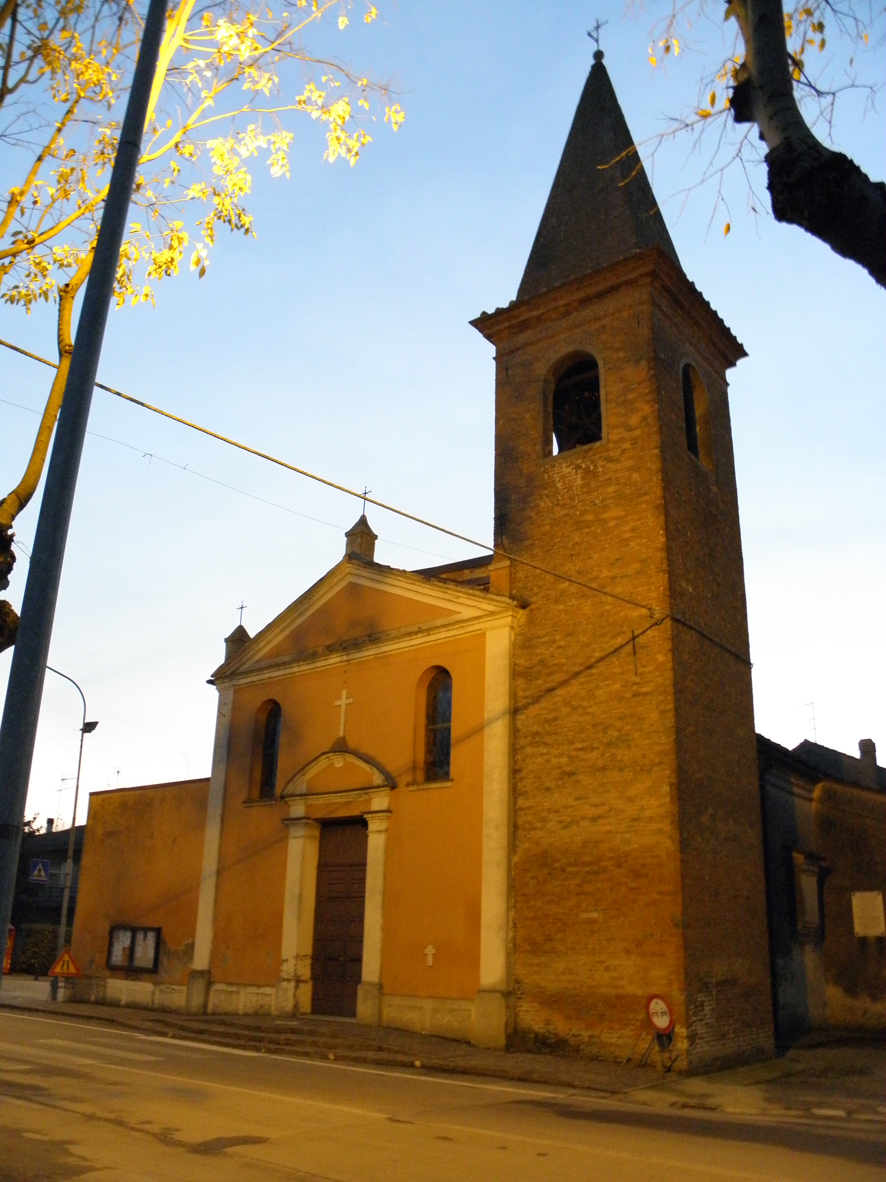 Masi San Giacomo, frazione di Masi Torello: la chiesa di San Giacomo Maggiore (XV secolo).